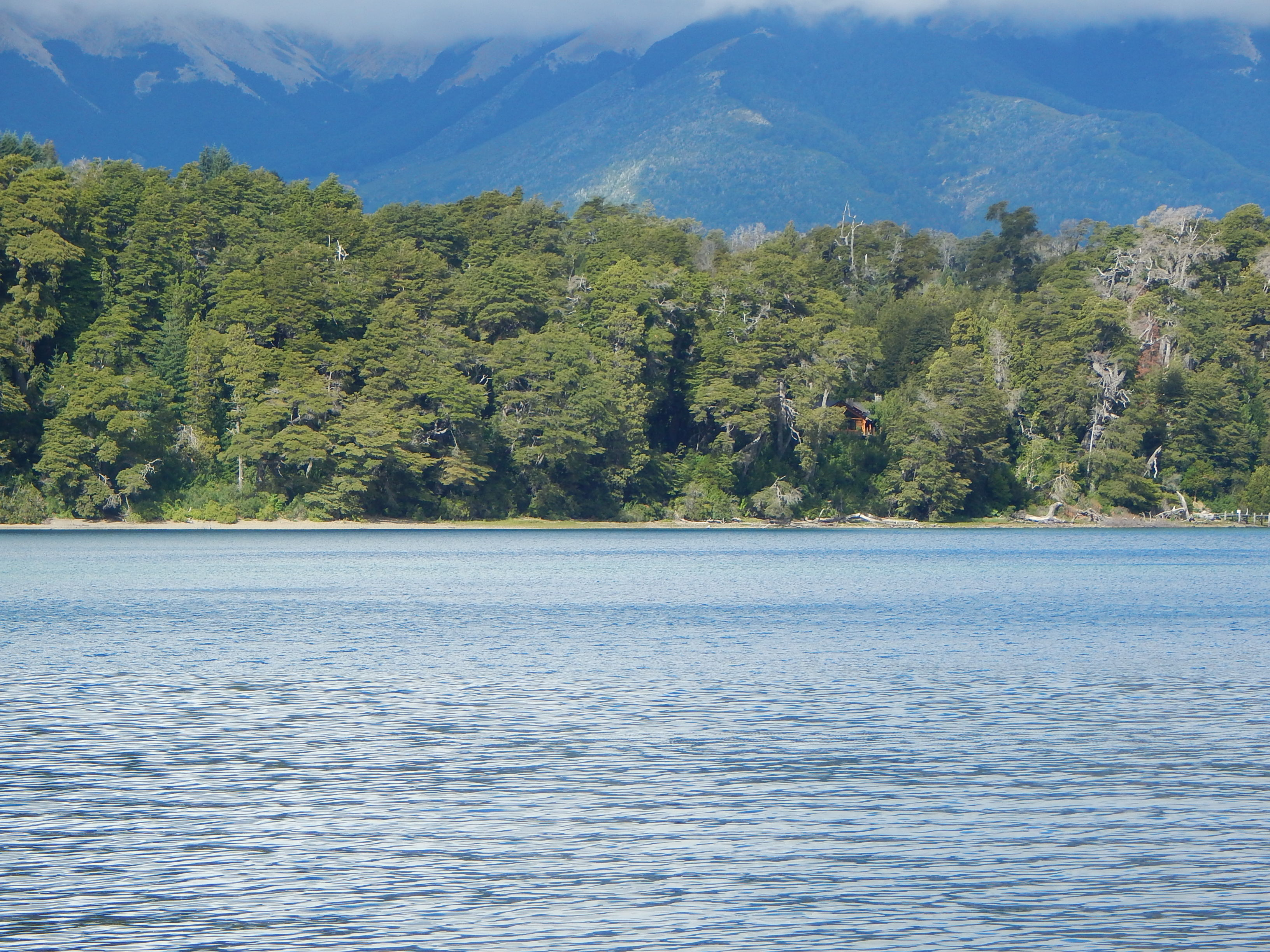 Bosques andino patagonicos